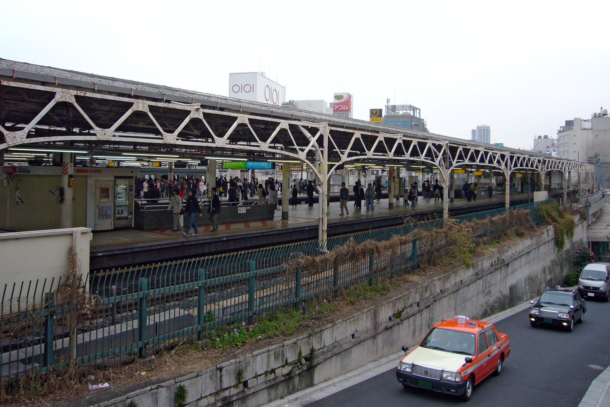 Ueno station in Taito-ku, Tokyo, Japan